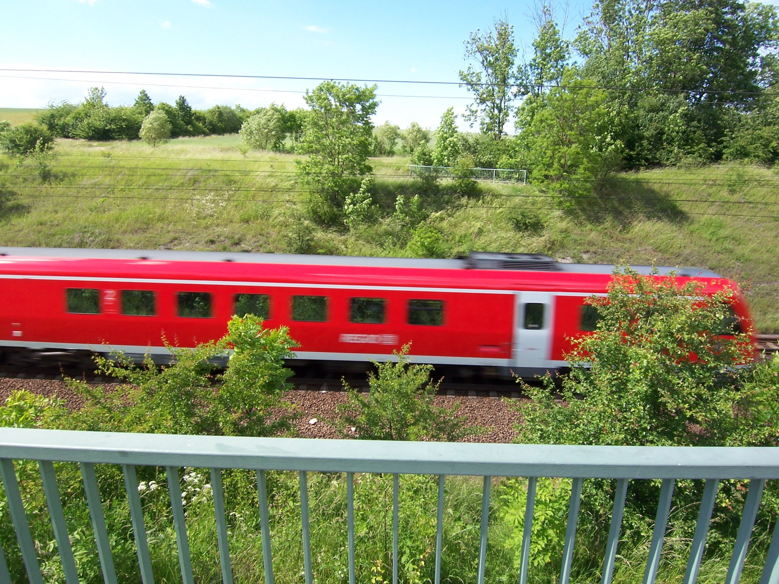 Der Leinakanal unterfließt die ICE-Strecke westlich von Gotha.